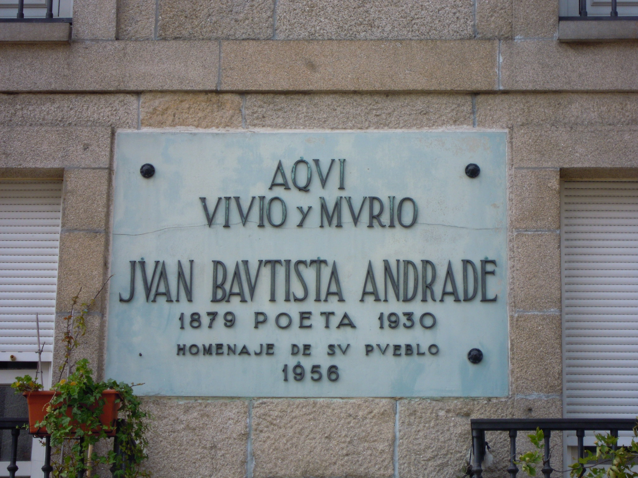 Placa no edificio en que viviu e morreu Xoán Bautista Andrade en Lérez (Pontevedra), na rúa que na actualidade leva o seu nome